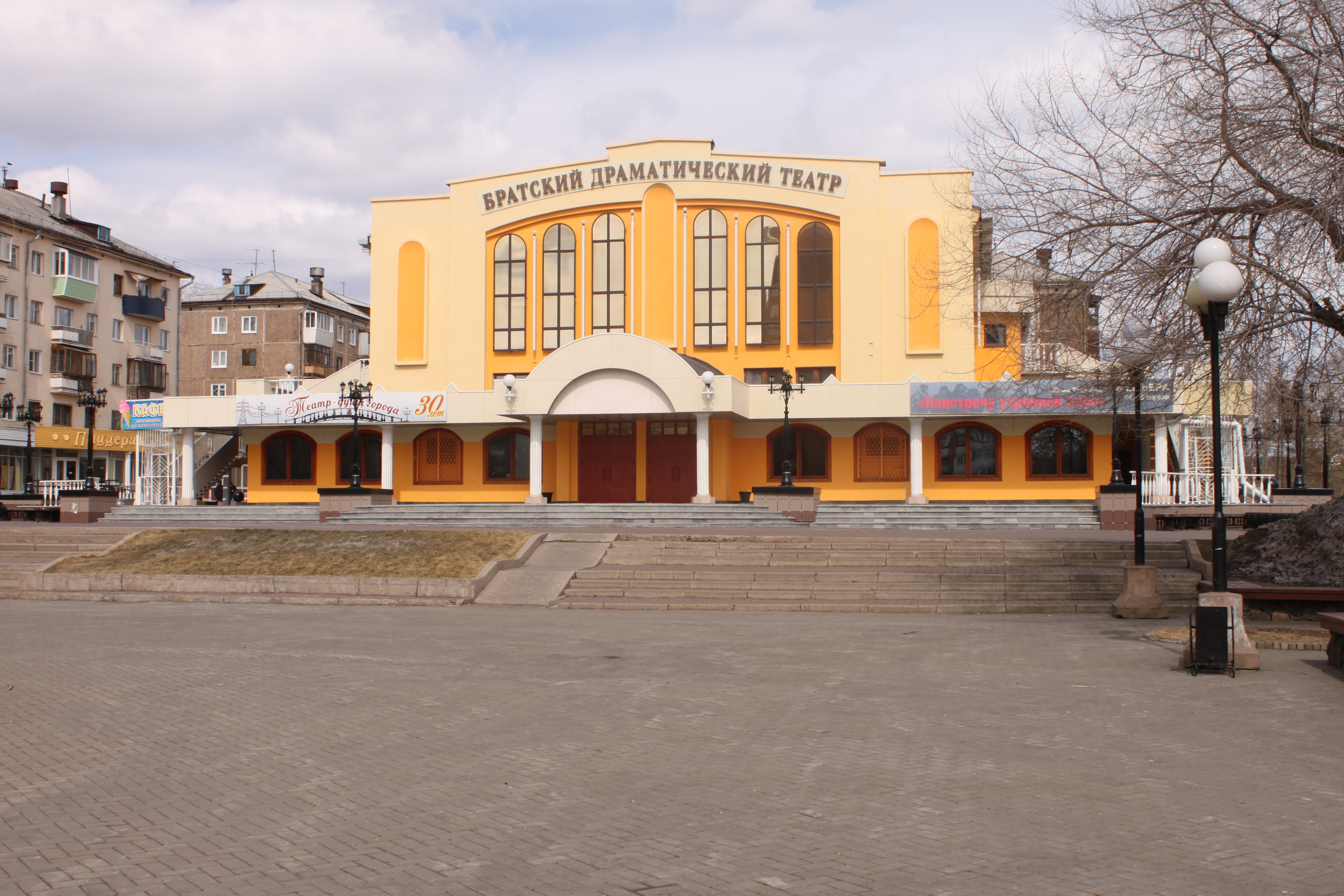 Братский драматический театр (город Братск Иркутской области)